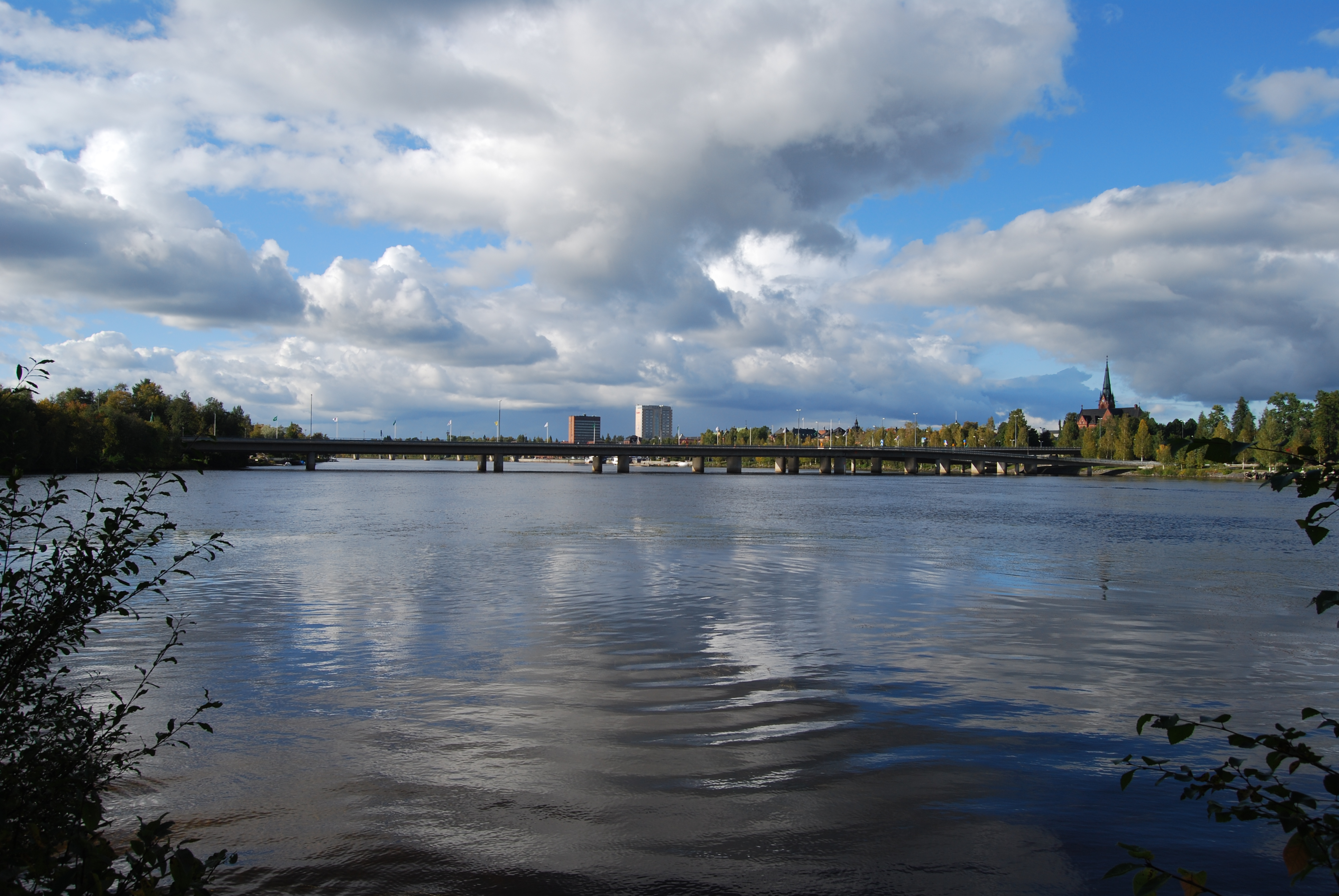 Kyrkbron i Umeå, sedd från Ön